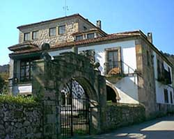 Casona de los Albo en Liendo (Cantabria). Vista del arco de entrada